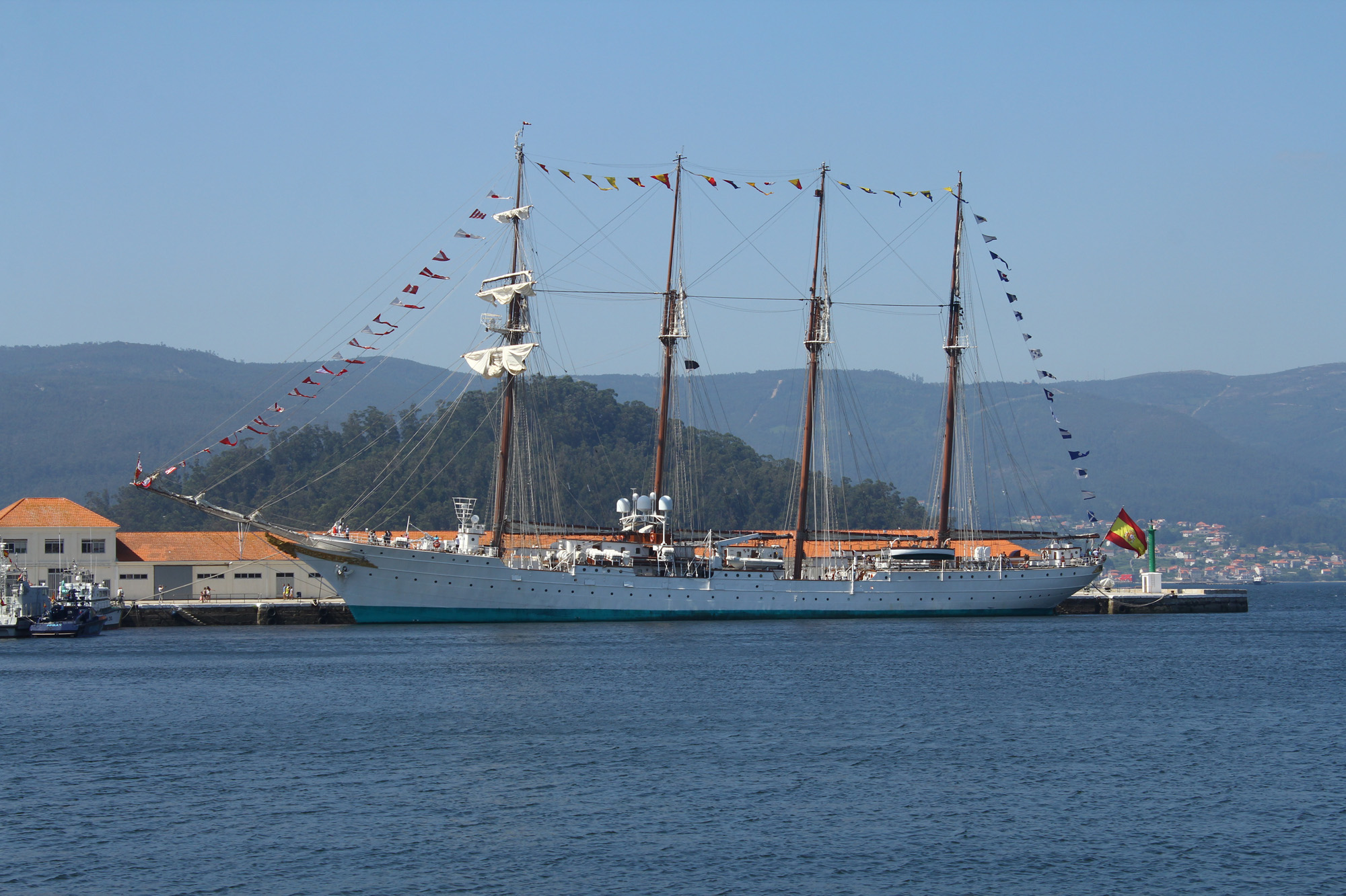 Visita a la Escuela Naval Militar de Marín. Julio de 2014